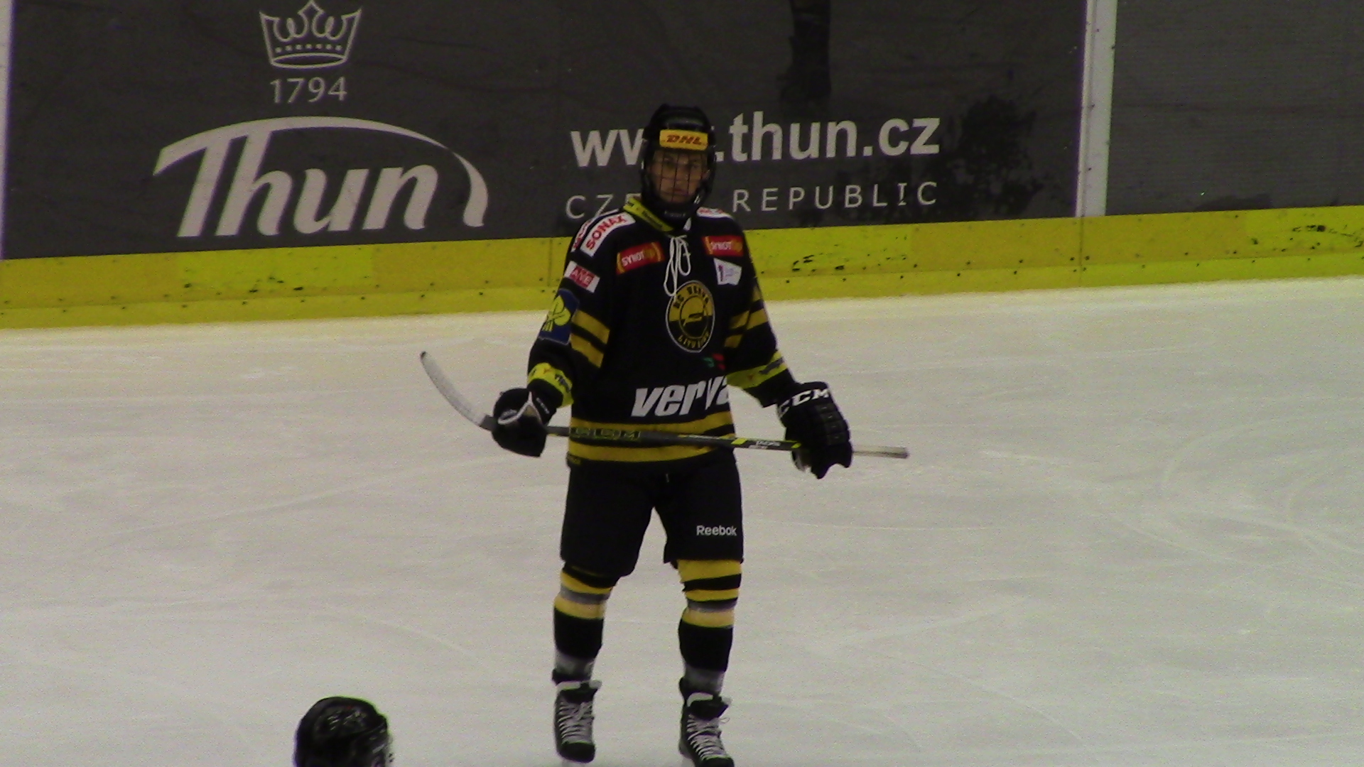 czech